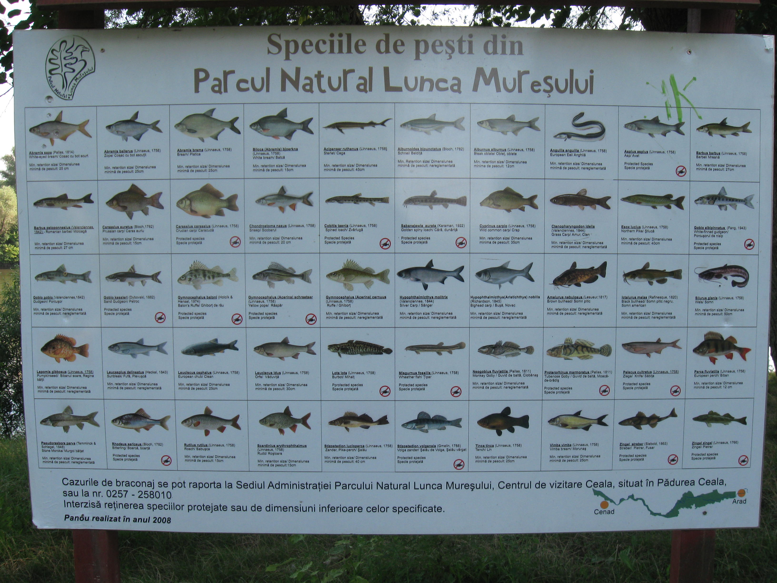 Pannó a Maros alsó szakaszának halfajaival Pécskán (Arad megye, Románia)